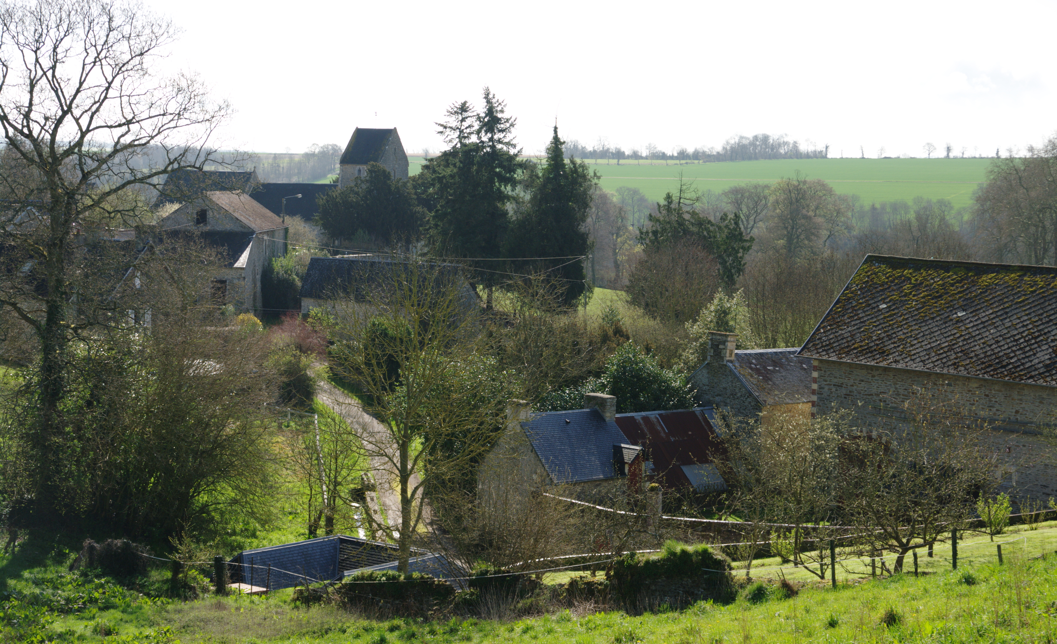 Une vue du village de Parfouru-sur-Odon, Calvados.